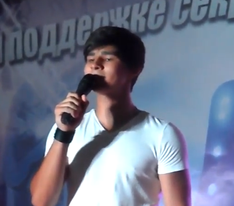 певец